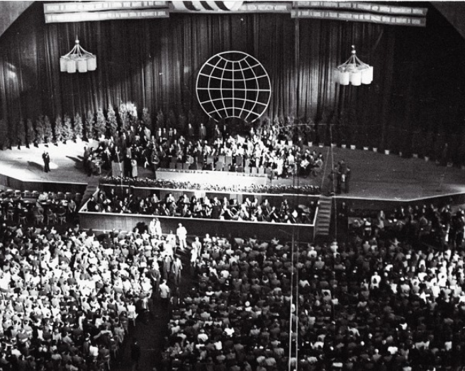 Plenum Kongresu Intelektualistów Wrocław 1948